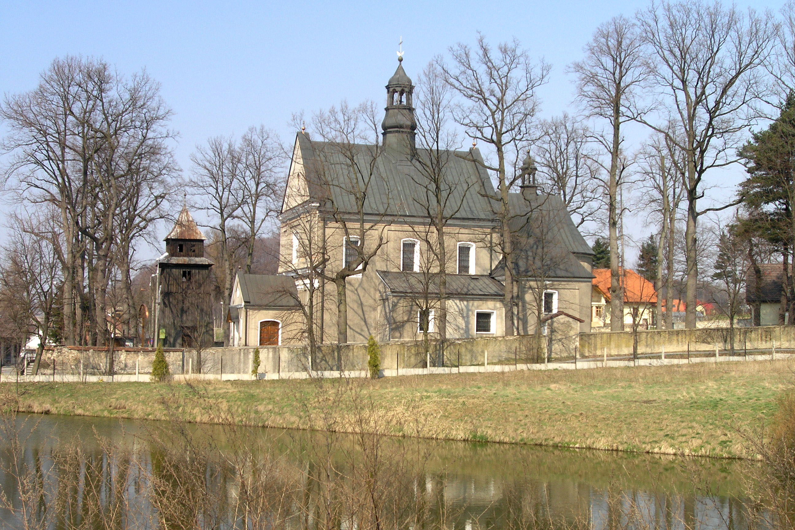 Kościół św. Katarzyny w Tenczynku